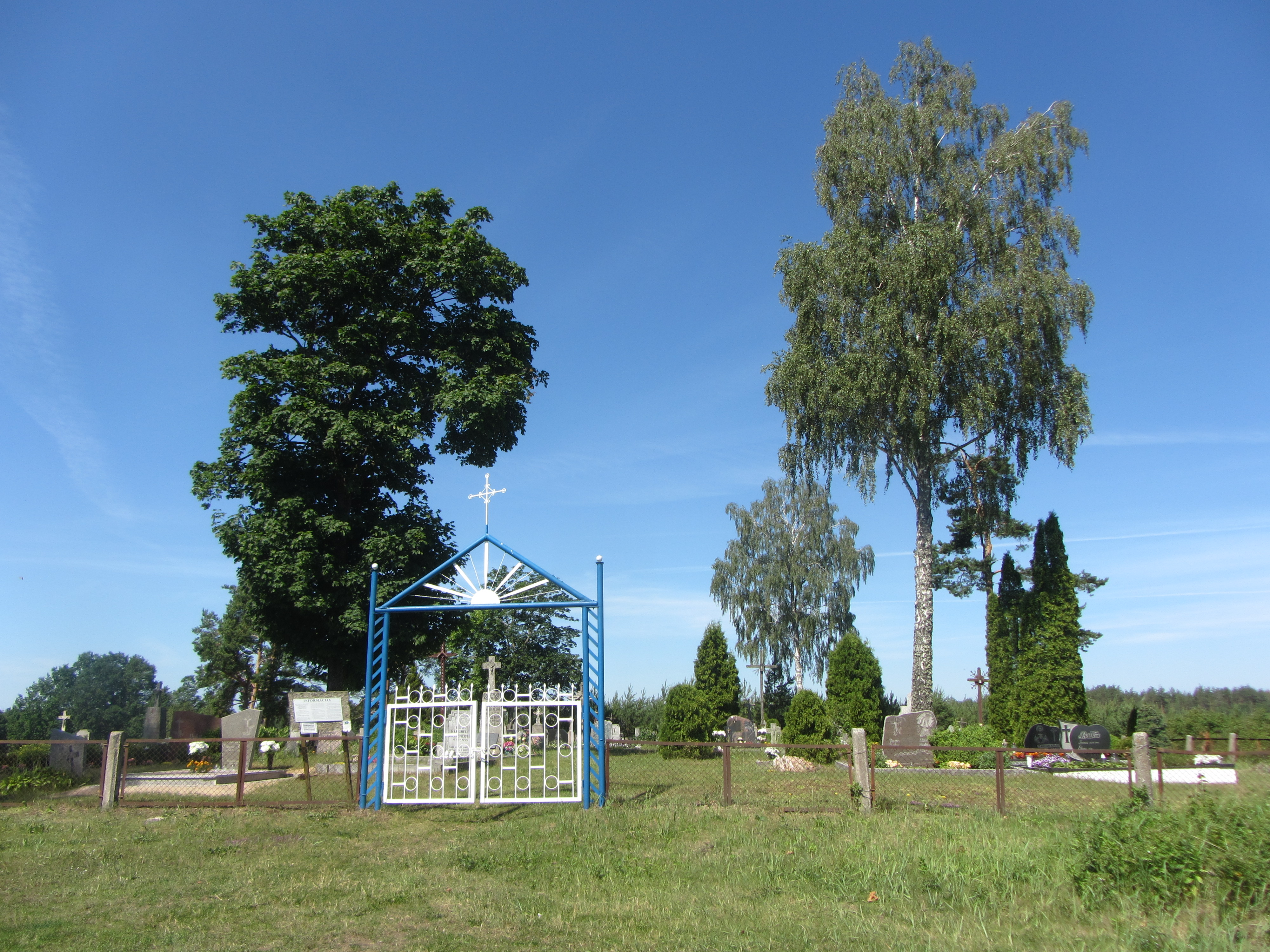 Varėnos sen., Lithuania